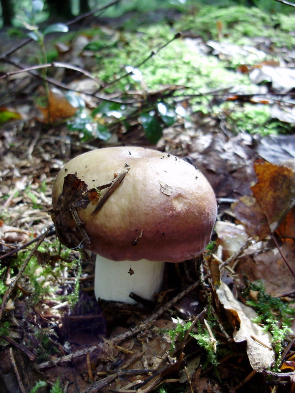 Russula decolorans. Karmėlava forest, Lithuania.